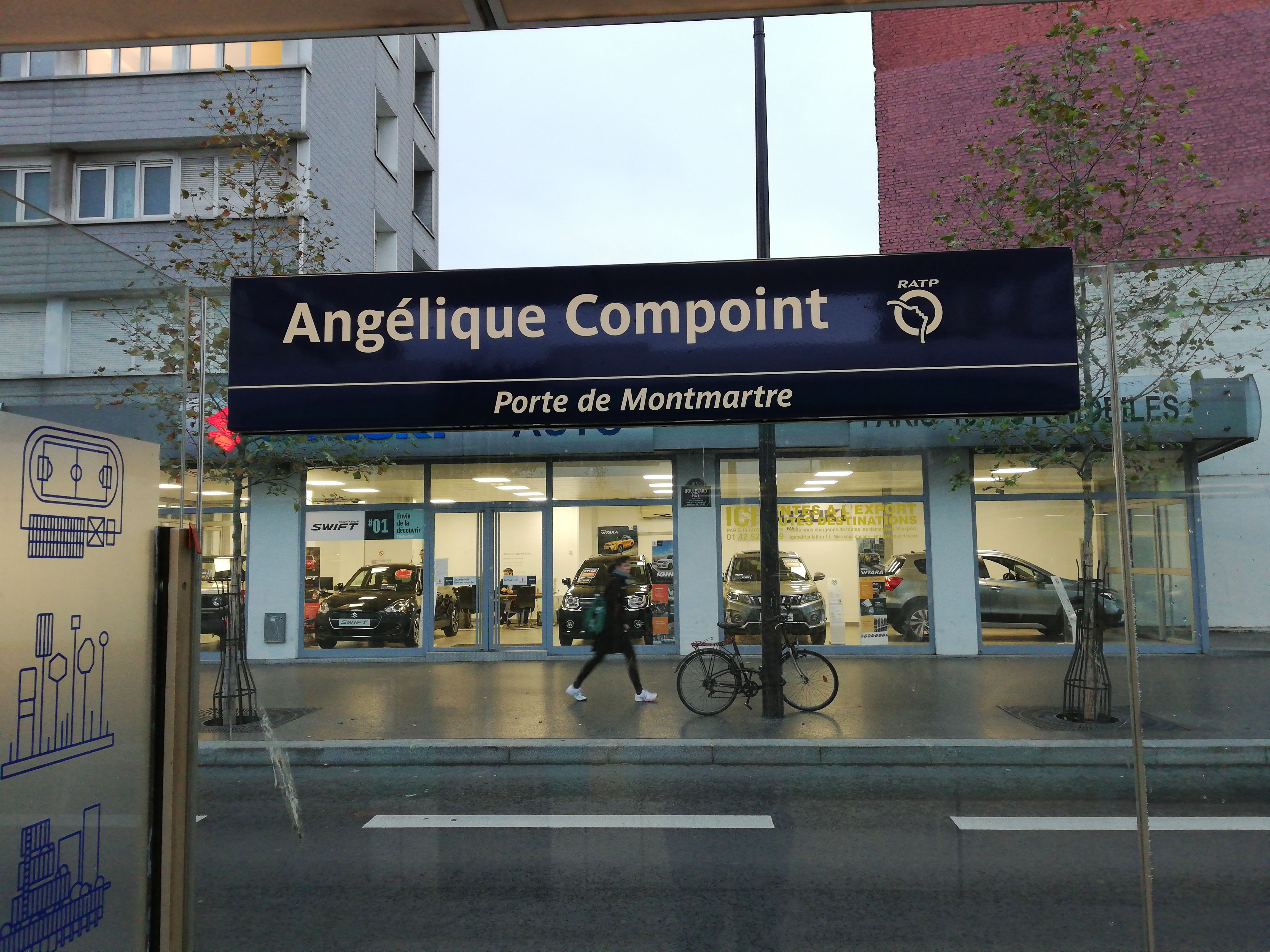 Plaque signalétique de la station Angélique Compoint - Porte de Montmartre de la ligne 3b du tramway d'Île-de-France, le jour de l'ouverture du prolongement de la ligne de Porte de la Chapelle à Porte d'Asnières, en 2018.